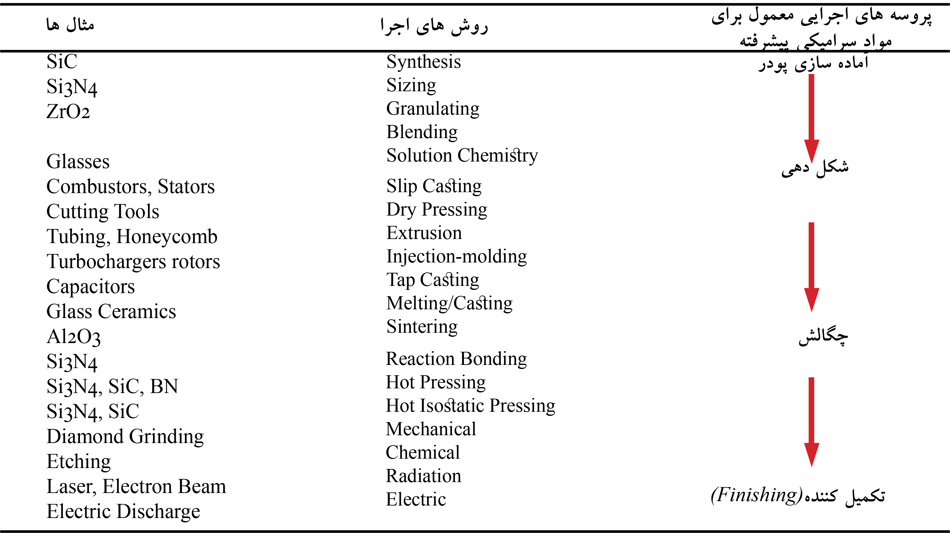 Common Steps Processing Operations for Advanced Ceramics